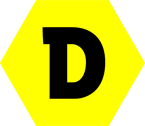 Disainiaasta logo